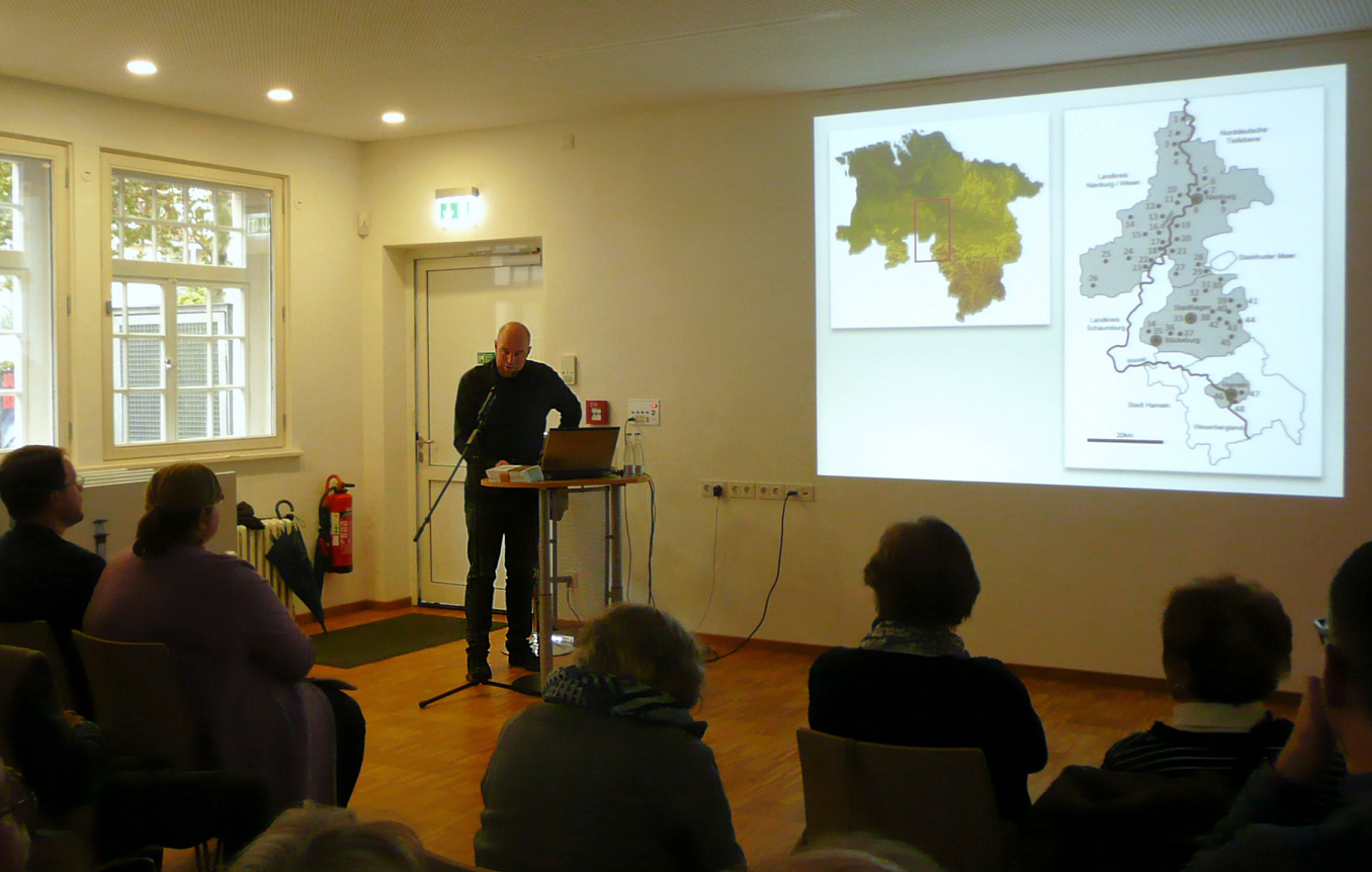 Daniel Lau bei einem Vortrag zur Eröffnung der Ausstellung zu 10 Jahren Kommunalarchäologie der Schaumburger Landschaft im Museum Hameln